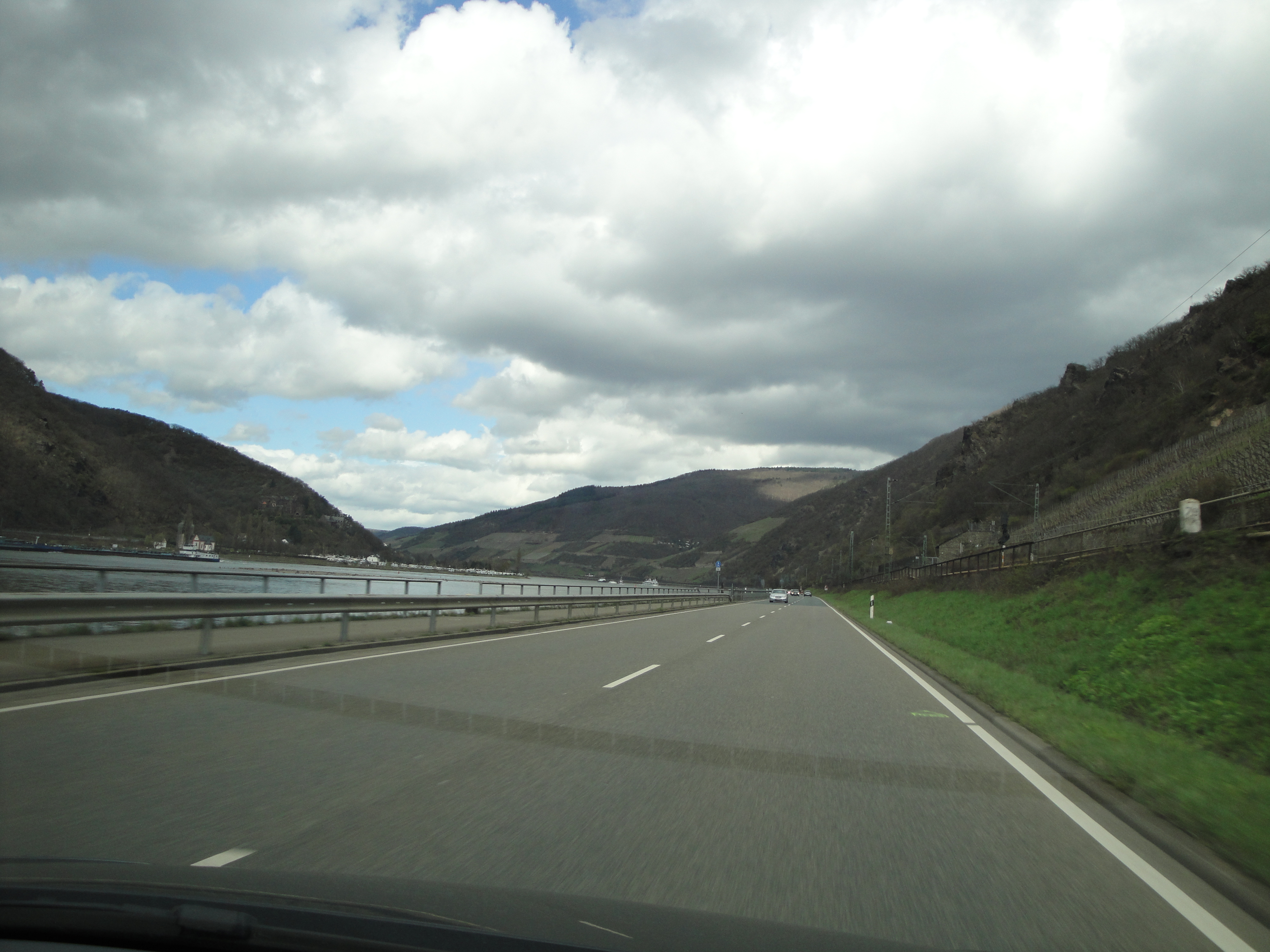 Die B42 entlang dem Rhein kurz nach Rüdesheim.